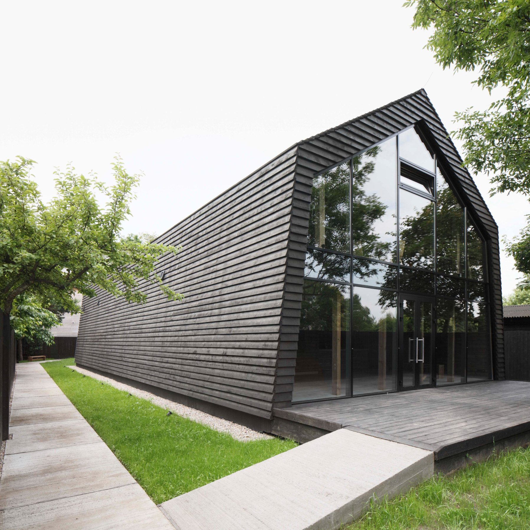 Muzeja ēka Ķīpsalā